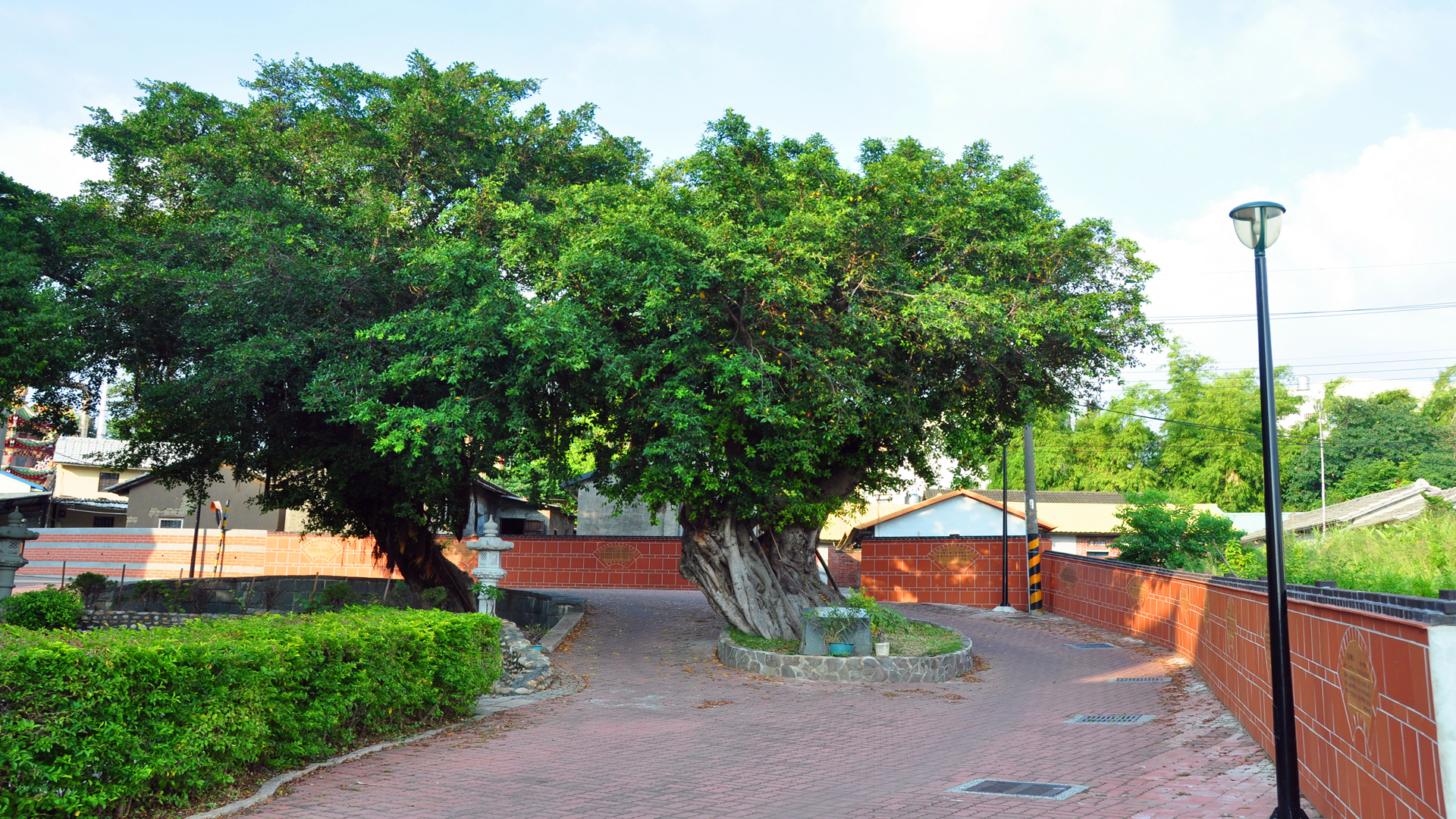 2013/05/30日前舊時龍目井雙榕抱泉樣貌。